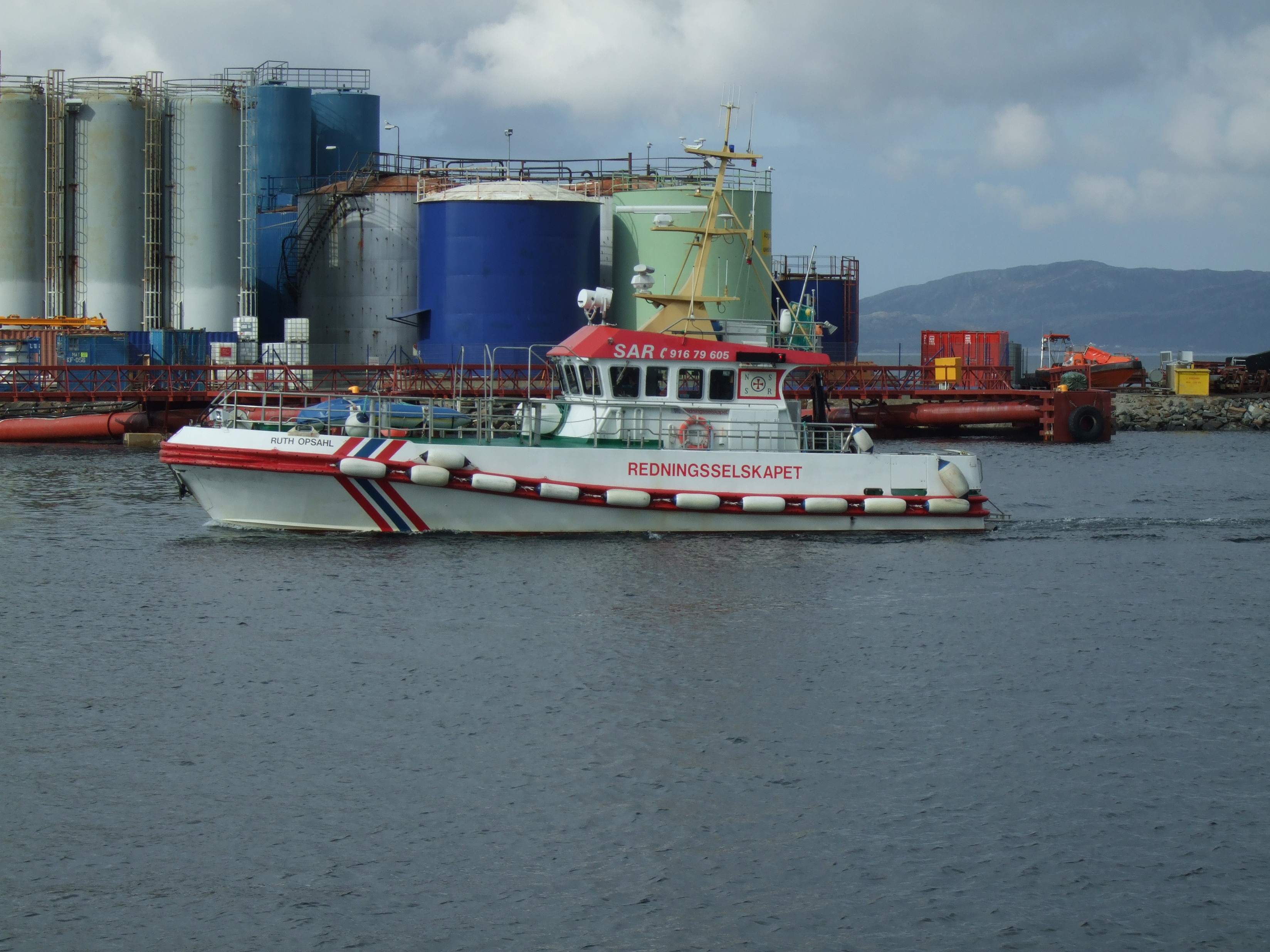 RS «Ruth Opsahl» i Sandnessjøen havn